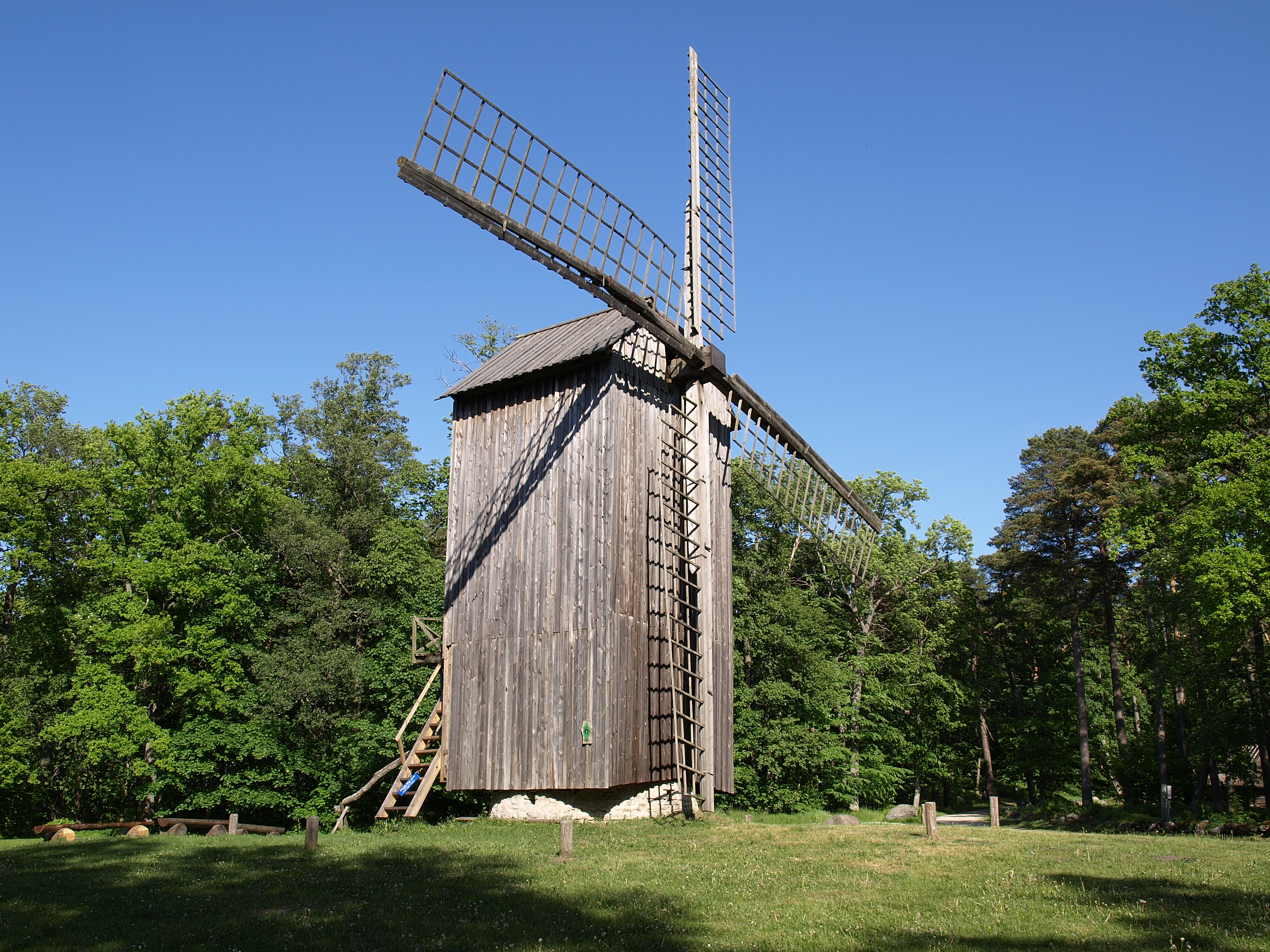 Ветряная мельница из Уленди (Эстонский Музей под открытым небом)